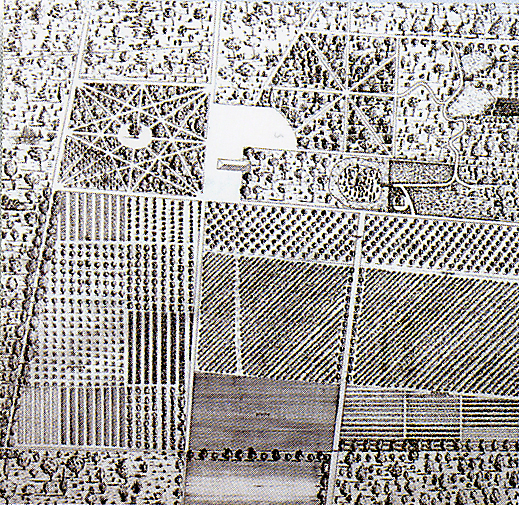 Croquis